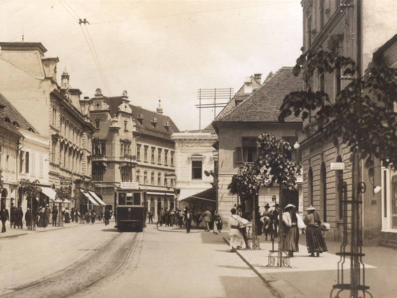 Sibiu, Str. Nicolae Bălcescu, fostă Heltauergasse